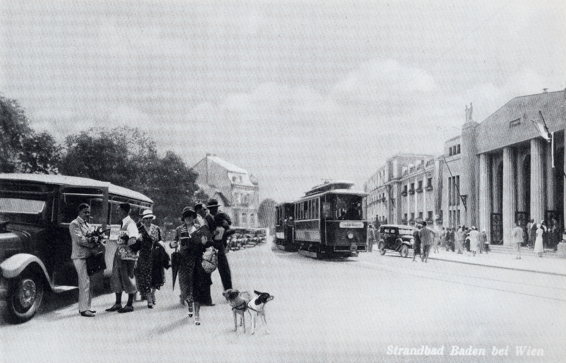 Elektrische Baden – Rauhenstein auf dem Weg ins Helenental (zwischen 1926 und Ende 1931)